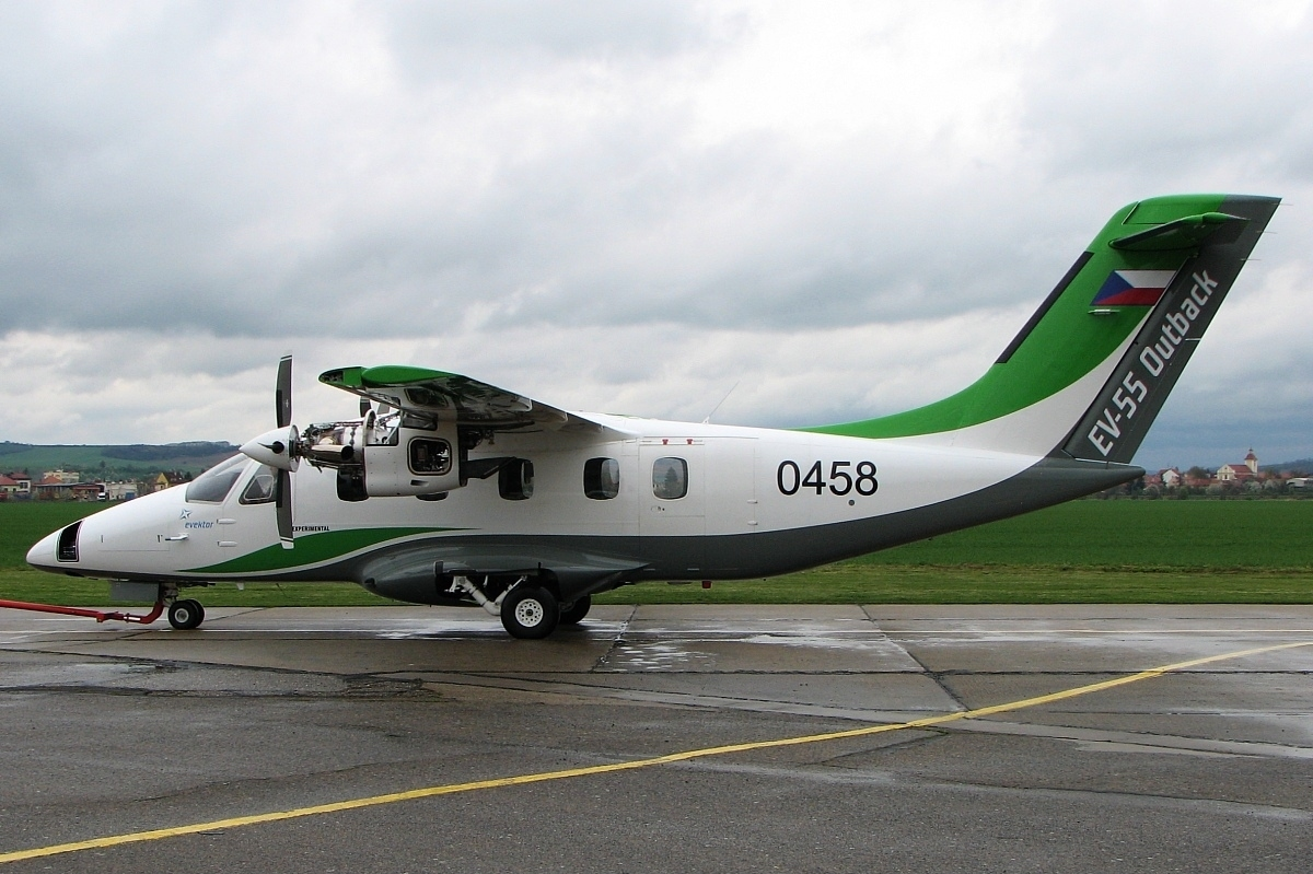 Po další motorové zkoušce